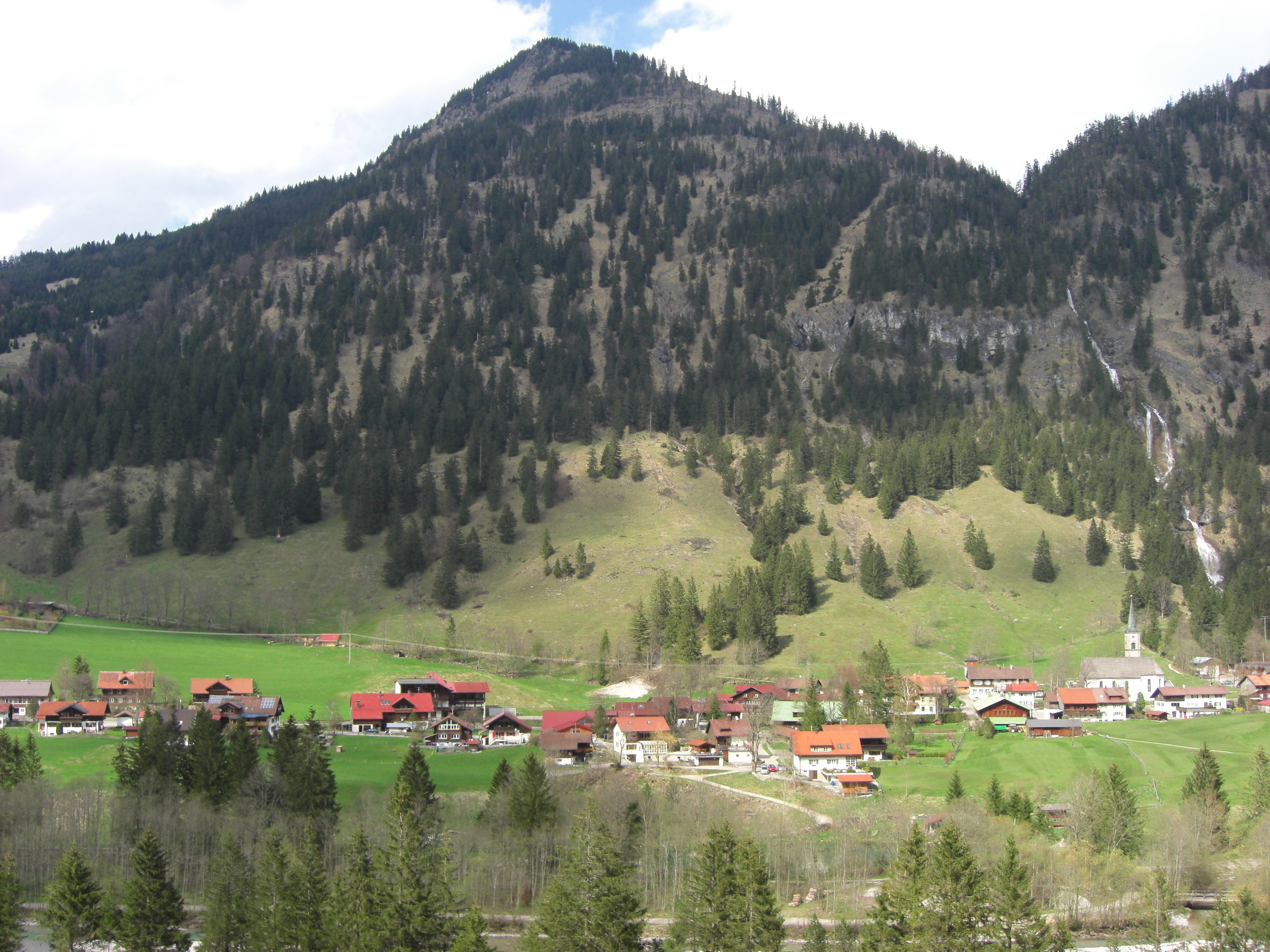 Mittleres Dorf von Hinterstein mit dem Zipfelsfall.